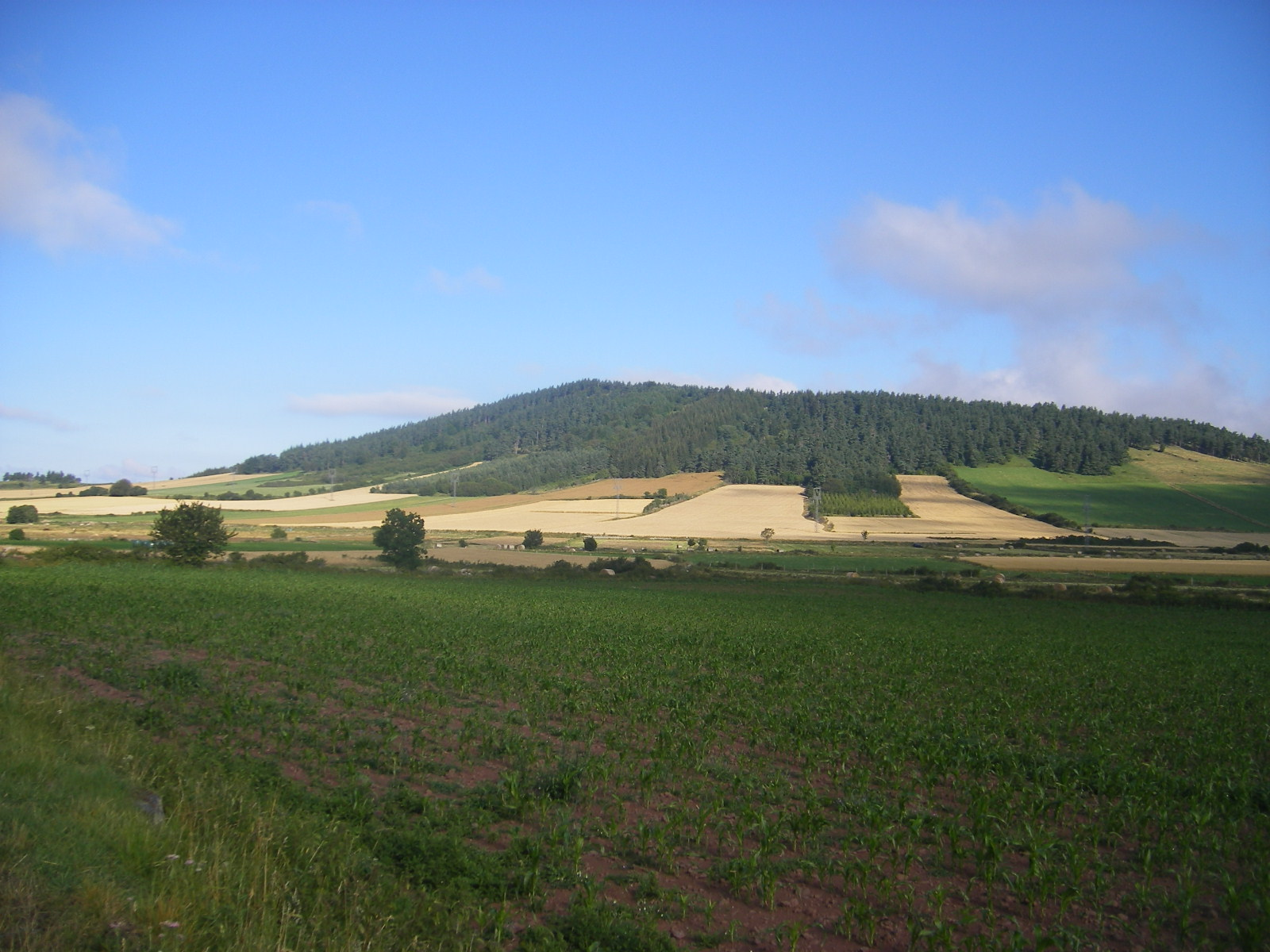 Monts du Devés between Montbonnet and Saint-Privat-d´Allier